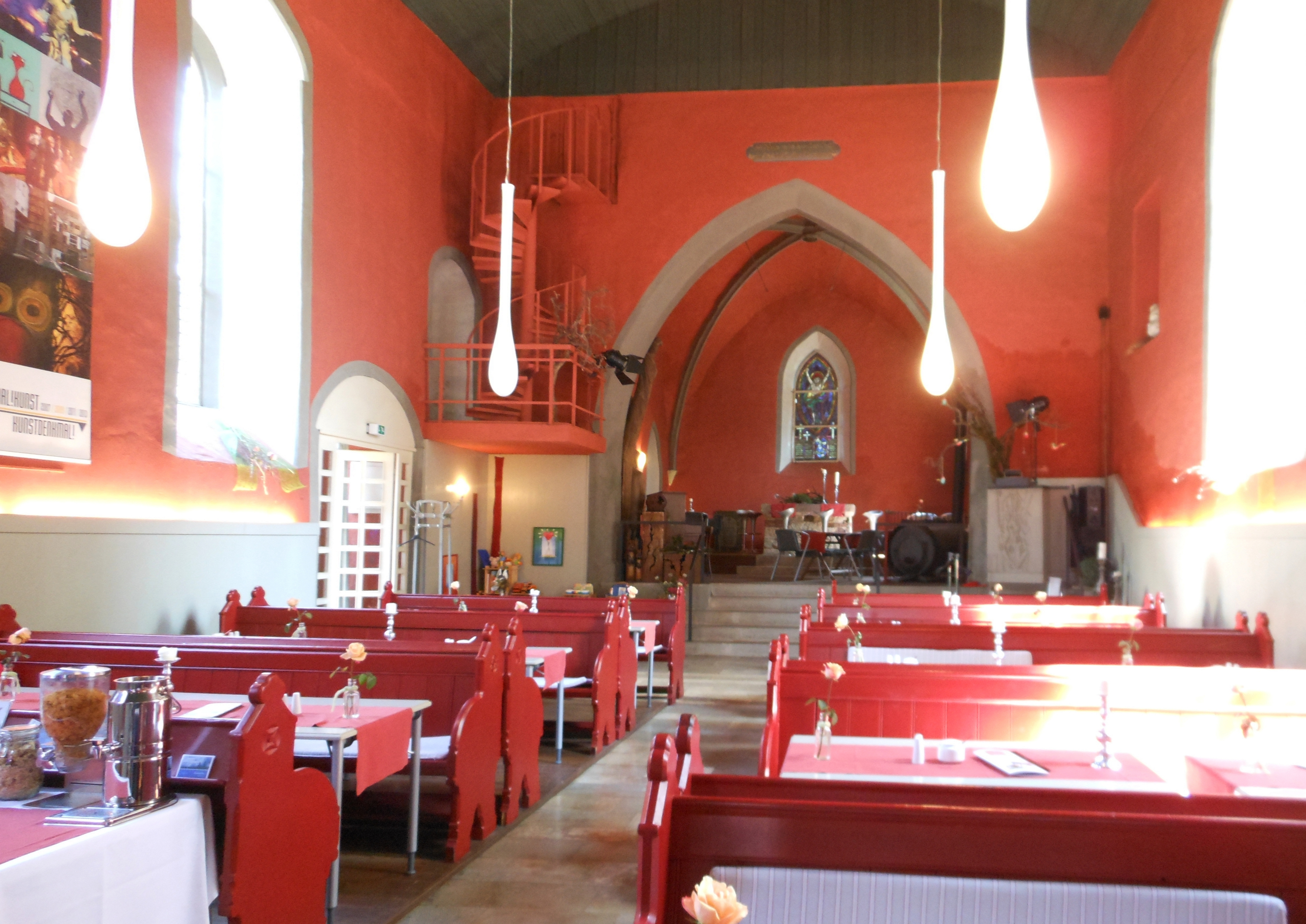 Hann. Münden, Café Ägidius